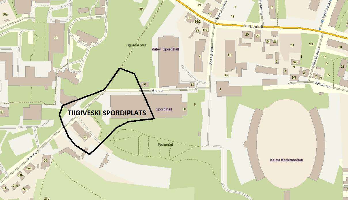 Tiigiveski spordiplats tänapäeva kaardil.